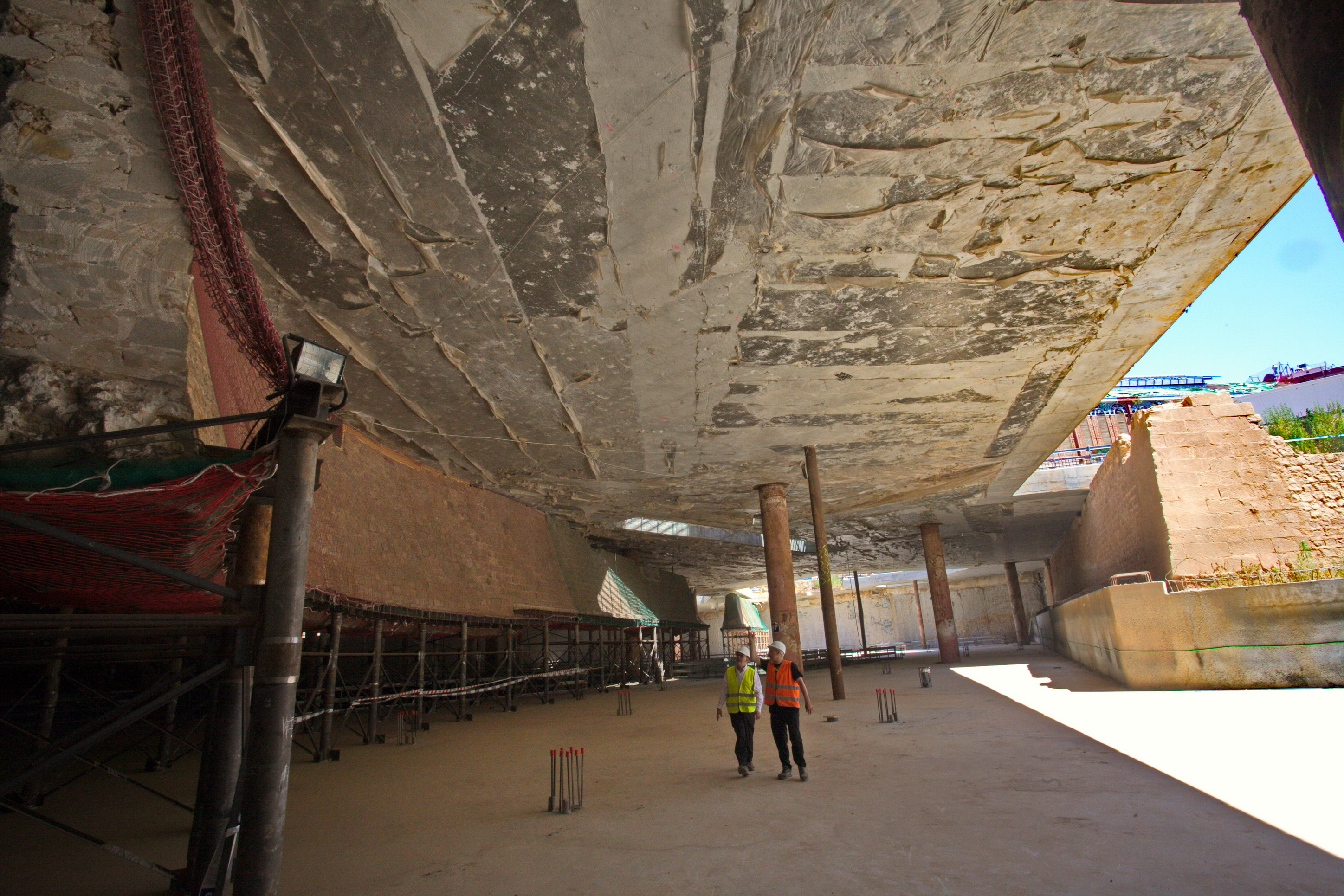 Mercat de Sant Antoni (Barcelona, 1879). Contraescarpa (esquerra) que, situada enfront del baluard de Sant Antoni (dreta), formava el fossat al voltant de la muralla medieval de Barcelona. Va ser descoberta durant les obres de remodelació de 2015.